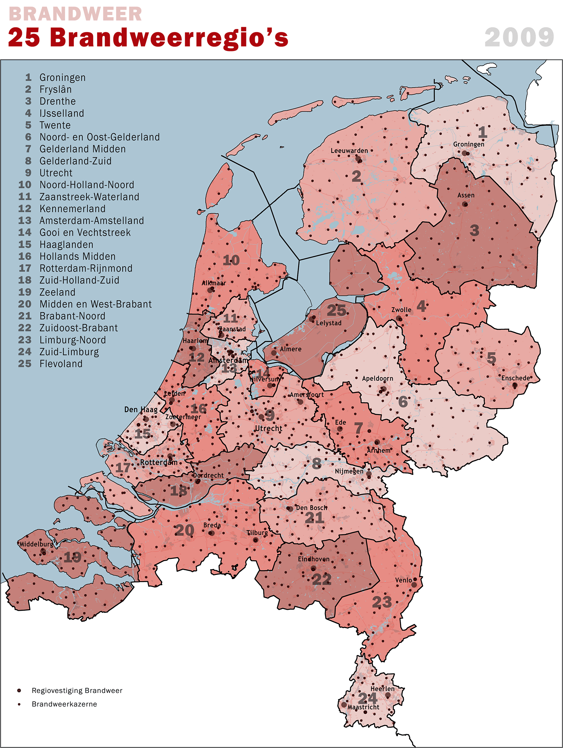 Brandweerregio's met Brandweerkazernes, detailview